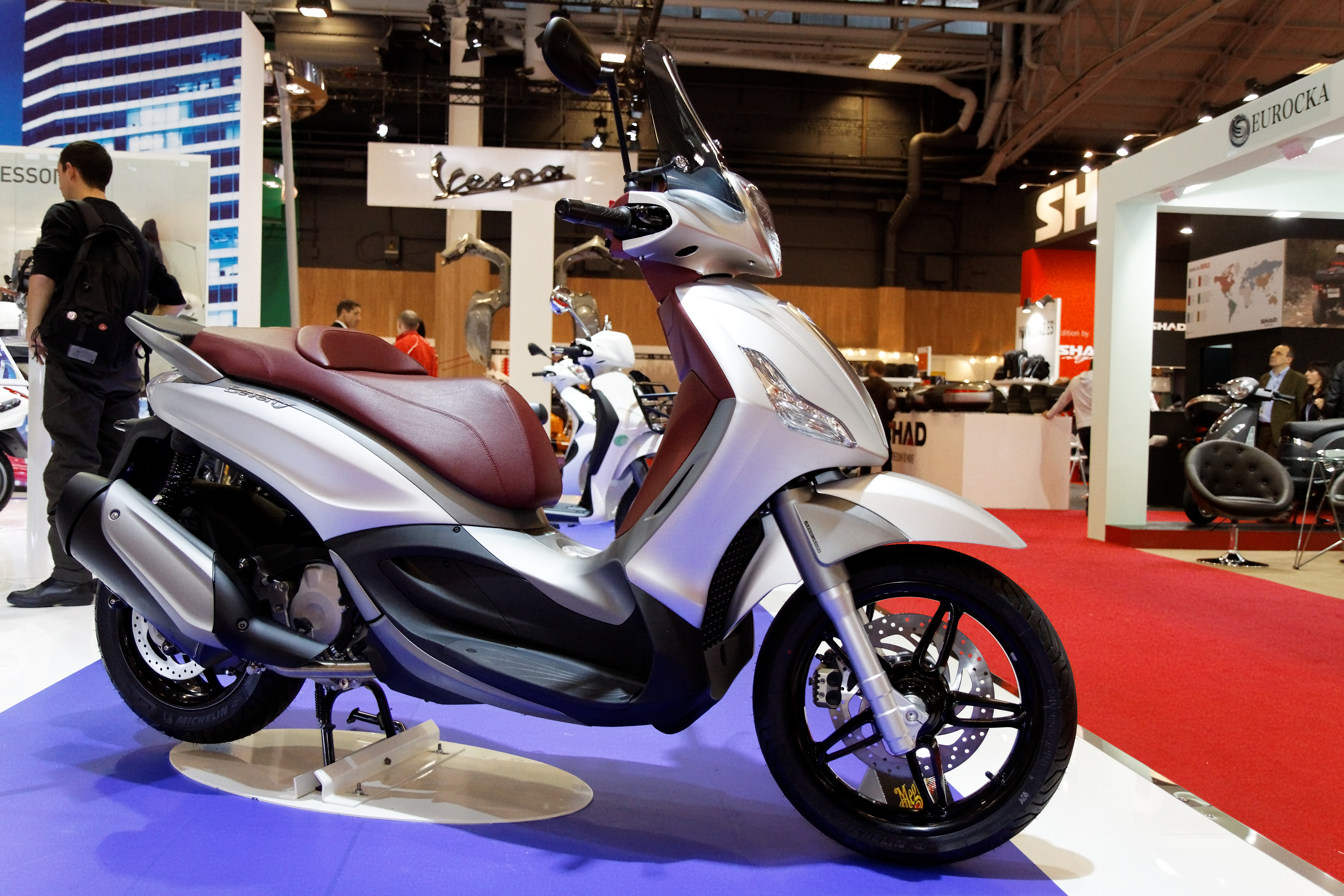 Piaggio - Beverly Sport Touring 350